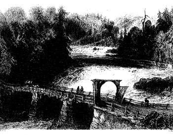 Le premier pont du Parc de la Chute-Montmorency en 1842.